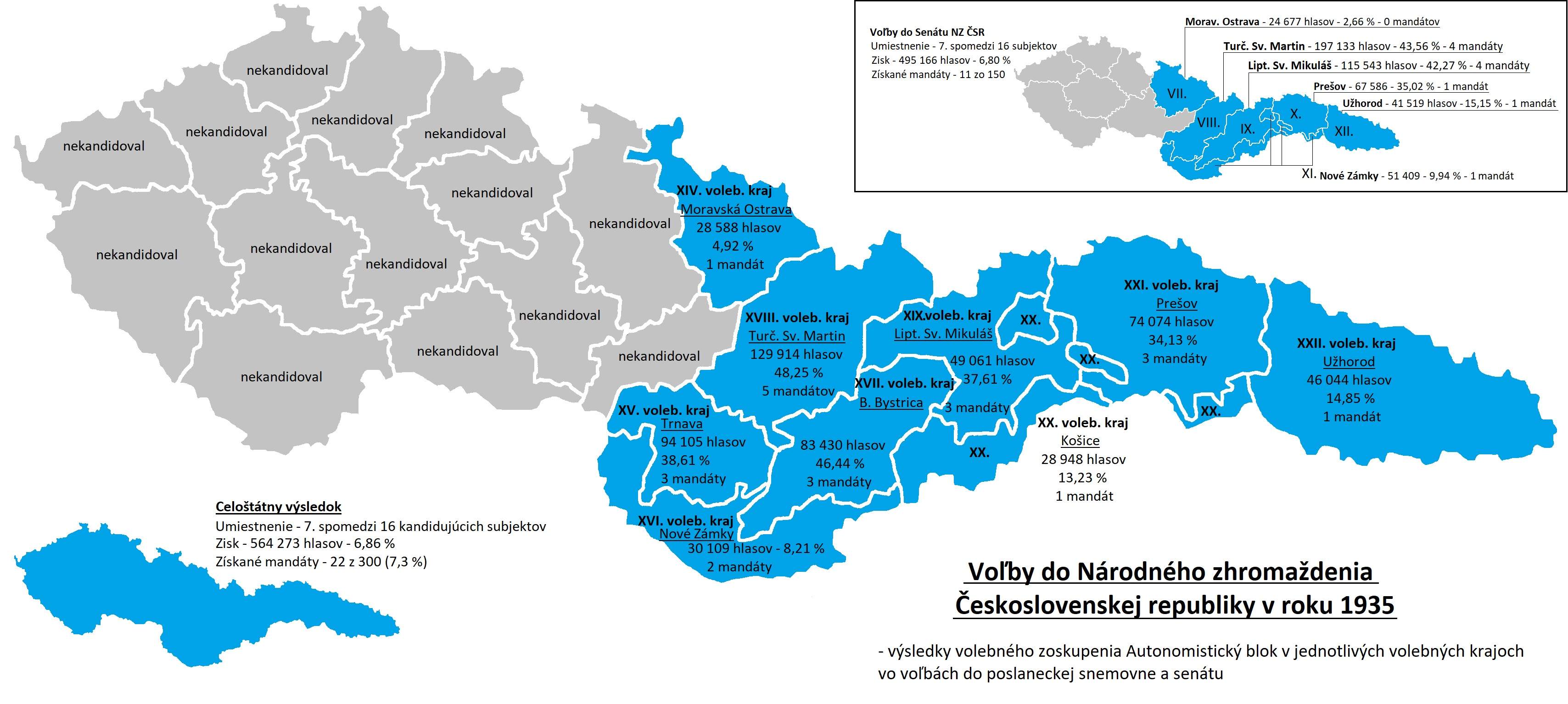 Zisky Autonomistického bloku v jednotlivých volebných krajoch vo voľbách do parlamentu a senátu